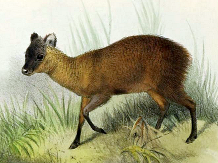 Ecuador pudu & Central American brocket